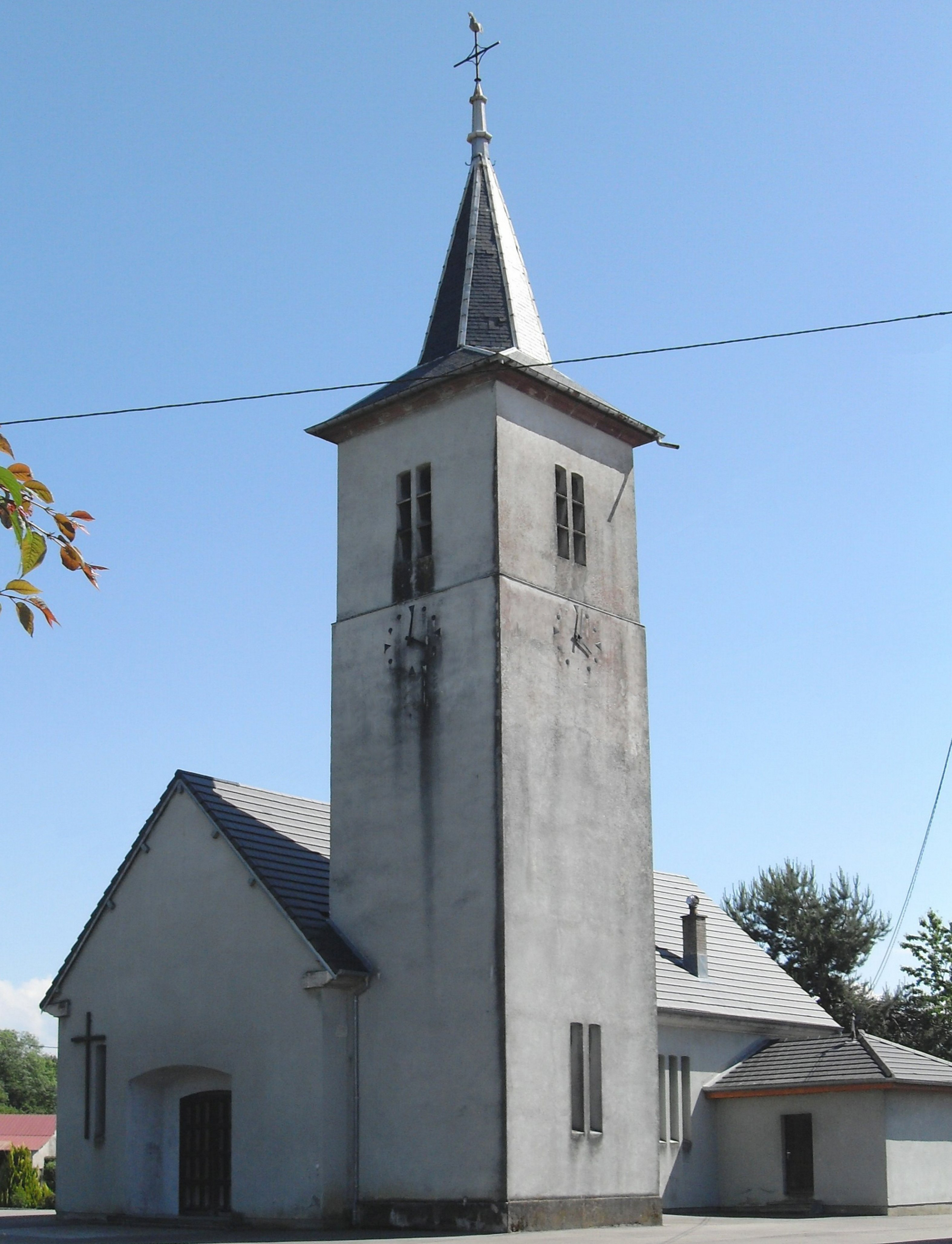 L'église Saint-Nicolas à Lepuix-Neuf